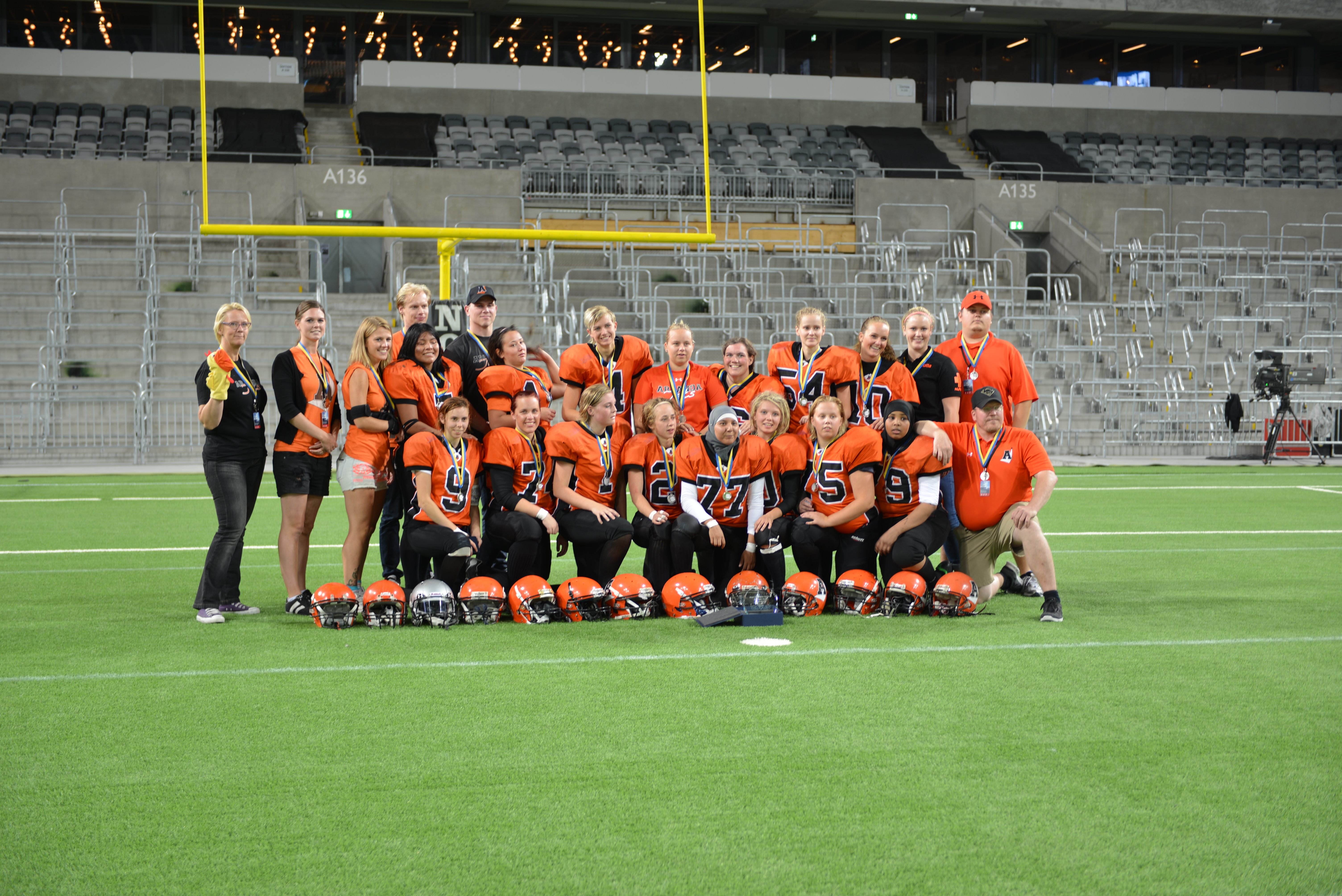 Bild från damfinalen i amerikansk fotboll mellan Stockholm Mean Machines och Arlanda Jets. Matchen spelades i Tele2 Arena och Mean Machines vann med 28-6.